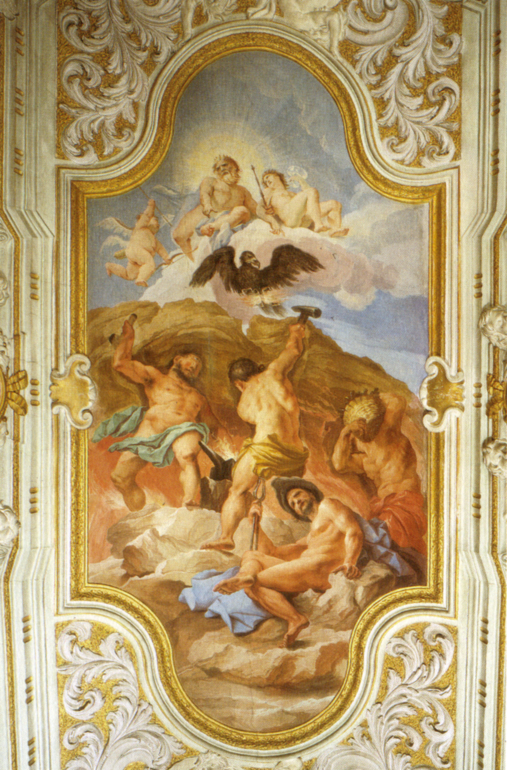 Palazzo ginori, affreschi settecenteschi by antonio ferri or domenico ferretti